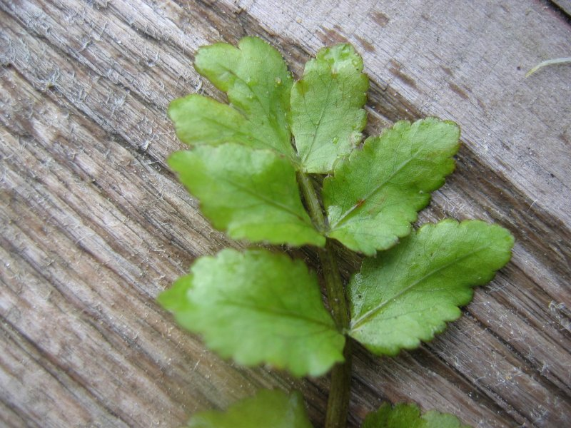 Blatt einer Berle Berula erecta